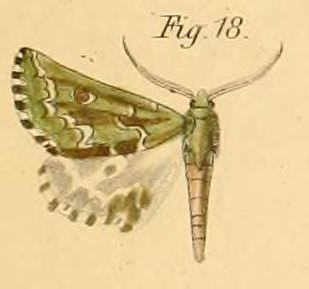 Drepanogynis bifasciata (Dewitz, 1881)